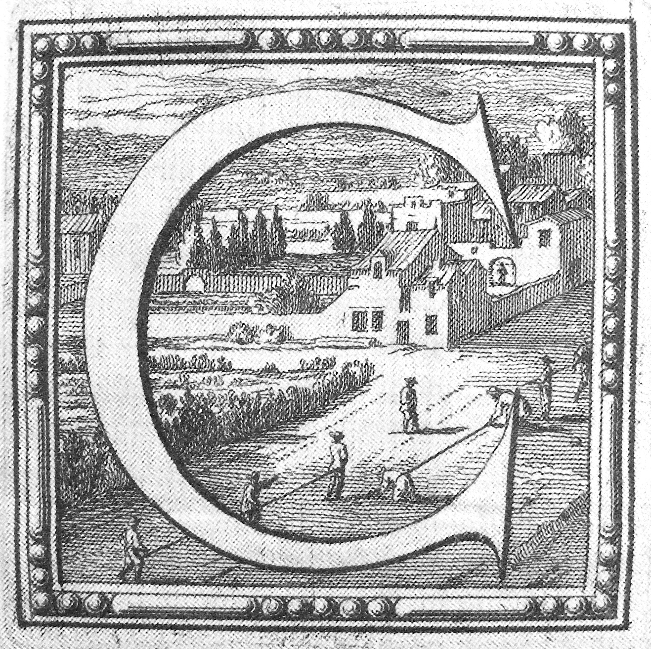 Mesure d'une base.